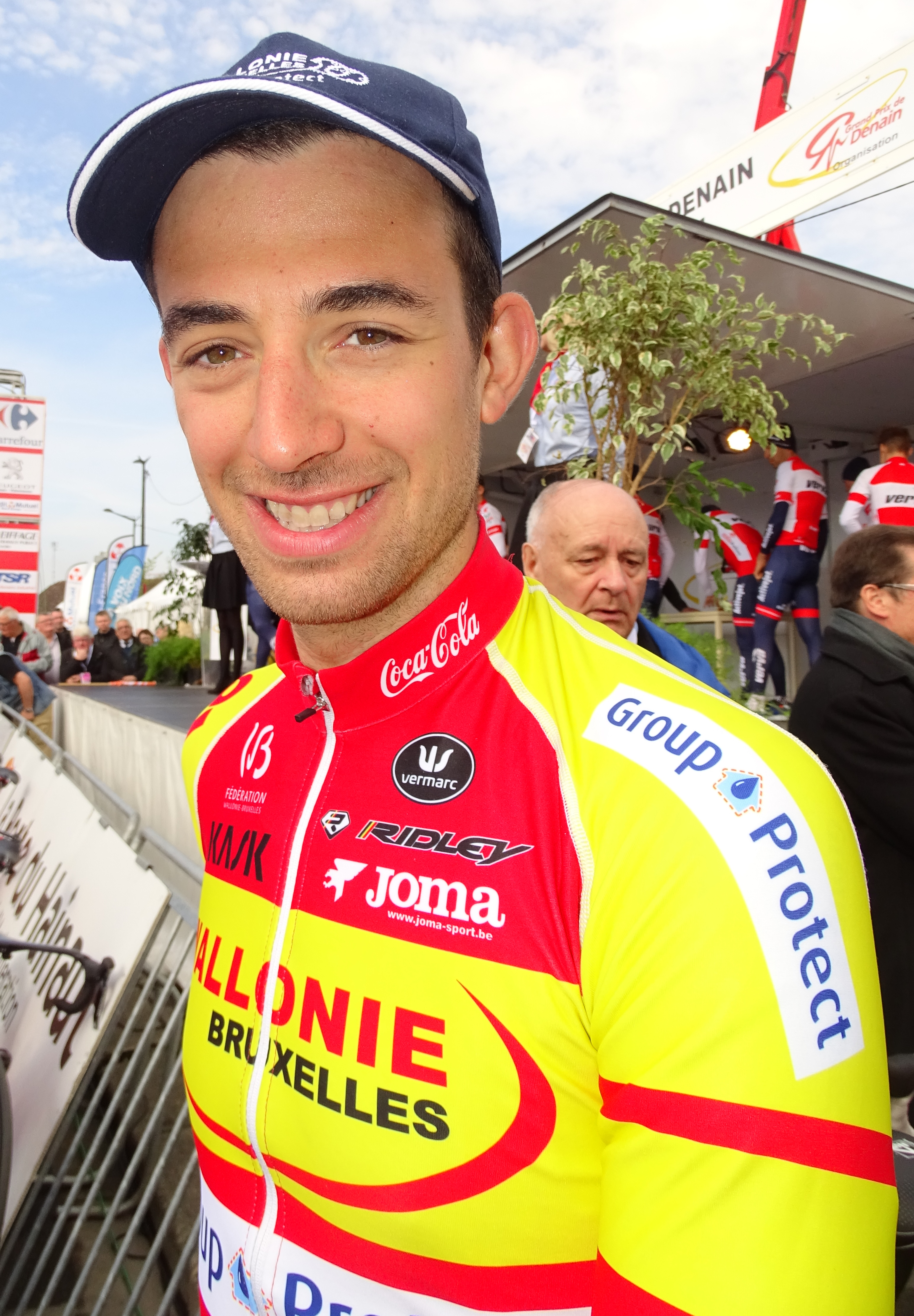 Reportage réalisé le jeudi 14 avril à l'occasion du départ et de l'arrivée du Grand Prix de Denain 2016 à Denain, Nord, Nord-Pas-de-Calais-Picardie, France.